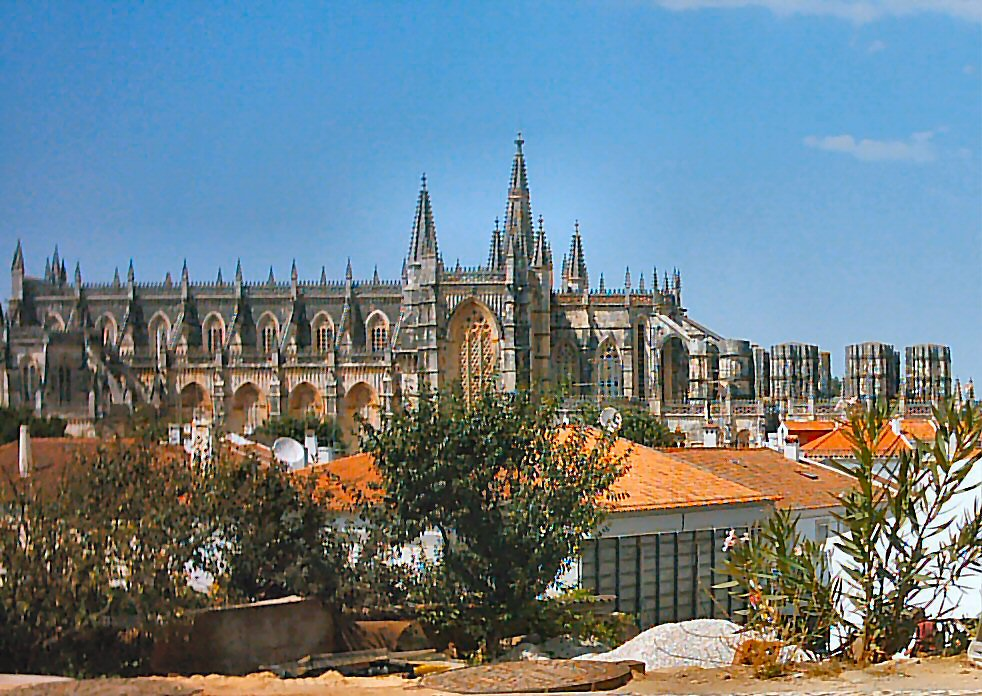 Mosteiro da Batalha, Portugal